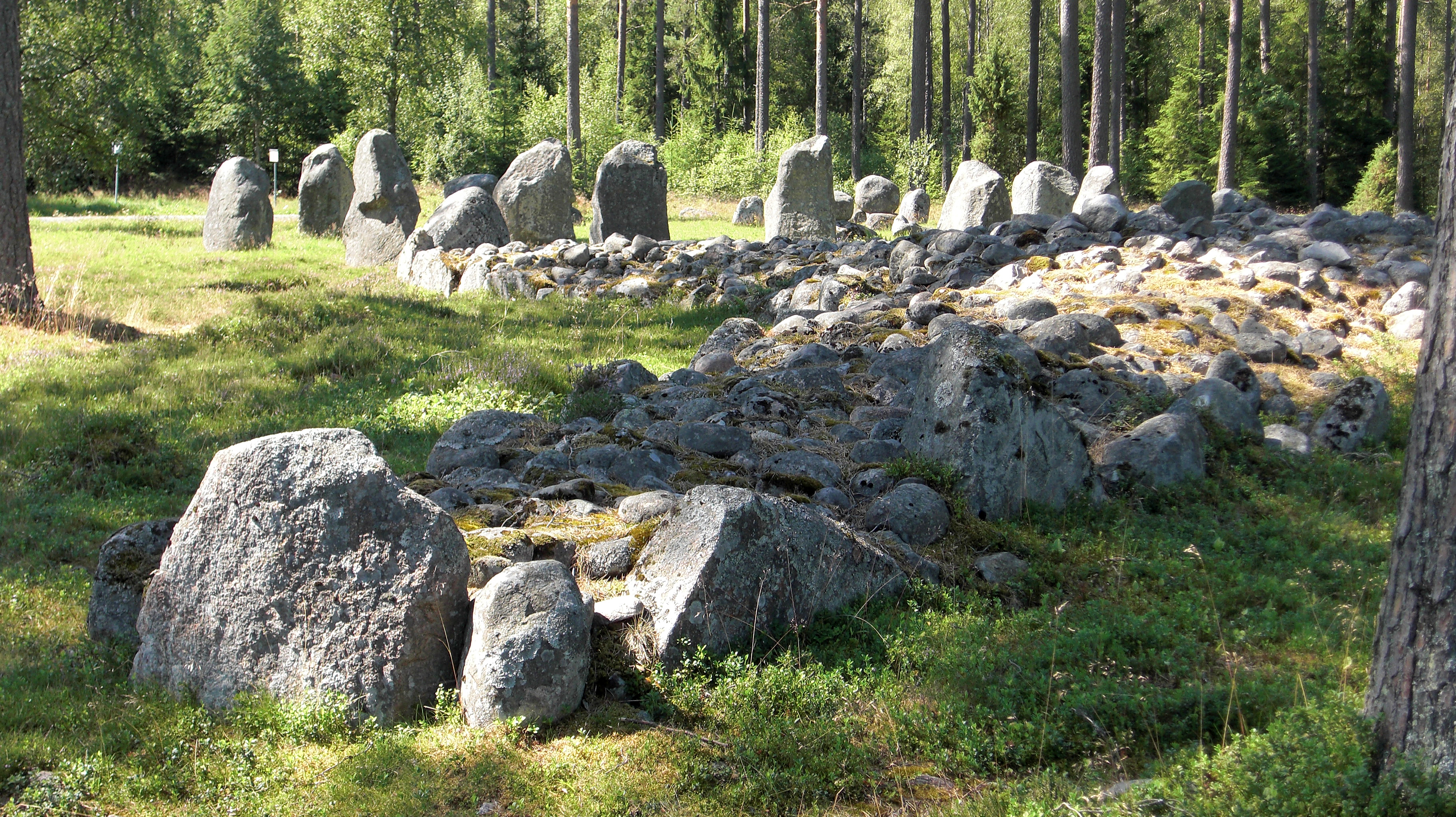 Treudden Stora Drakaröret på gravfältet Torsa stenar (Raä-nr Almesåkra 45:1) i Almesåkra socken, Västra härad, Njudungs småland, Småland, modernare Nässjö kommun, Jönköpings län, Sverige. Treudden är en av Sveriges största treuddar.